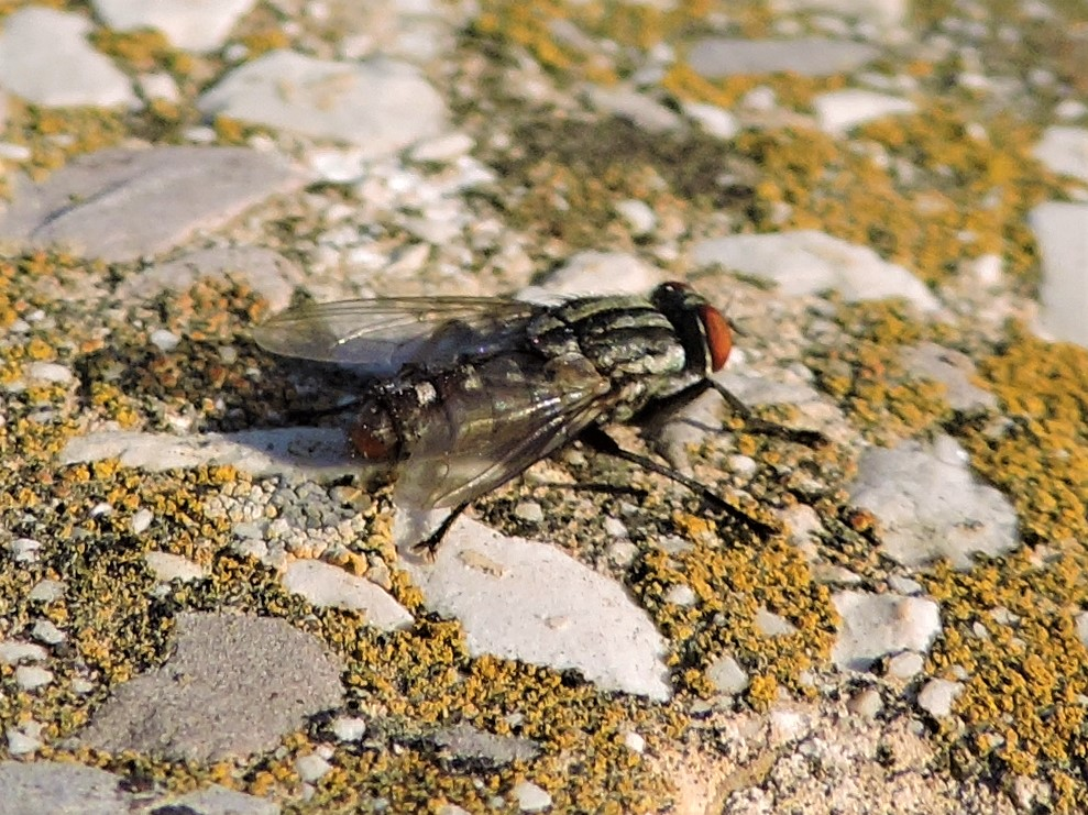 זבוב שחמטן במנוחה, תמונת-על, תל אביב יפו.